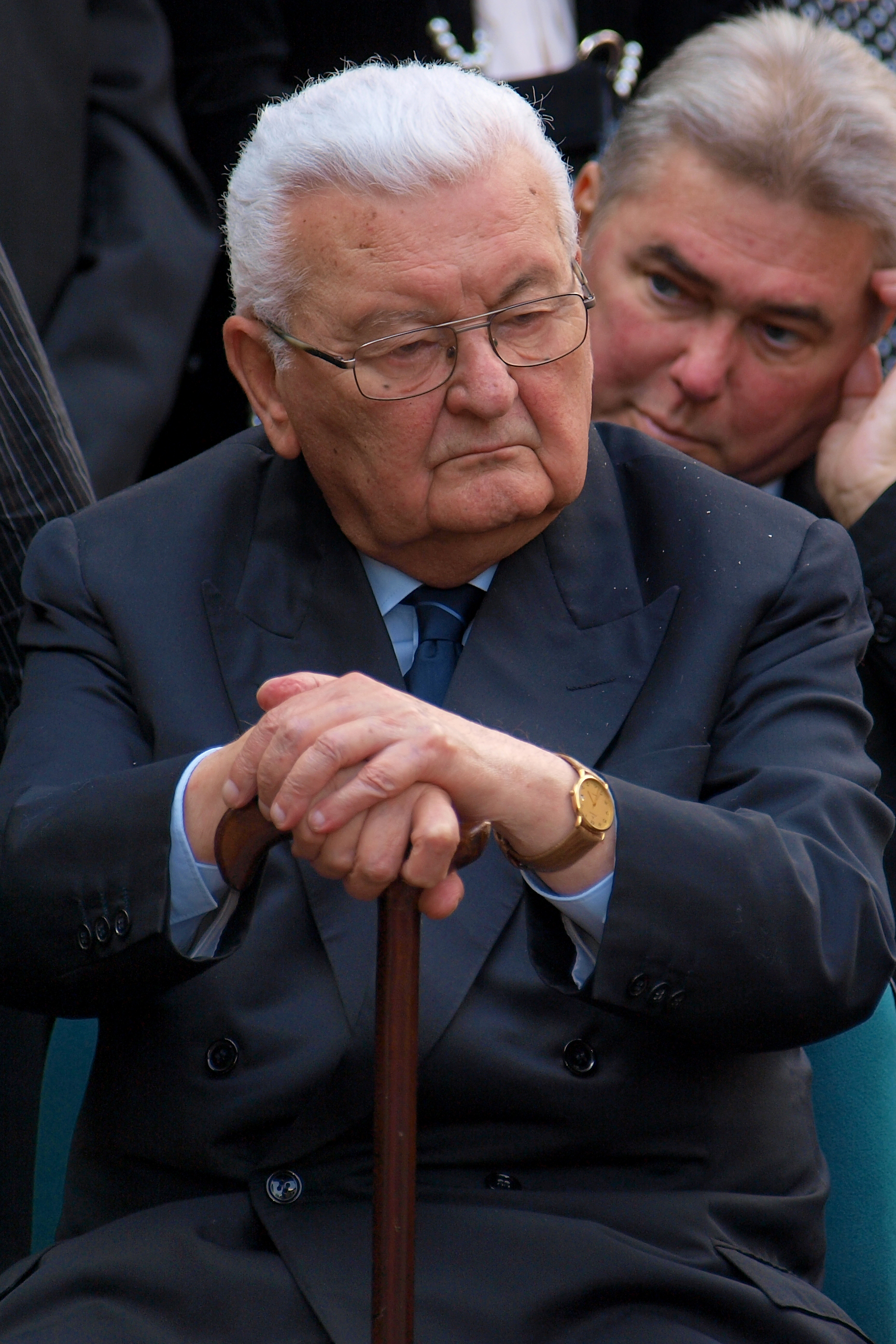 Boross Péter egykori kormányfő Kiss Péter temetésén (2014-08-15)